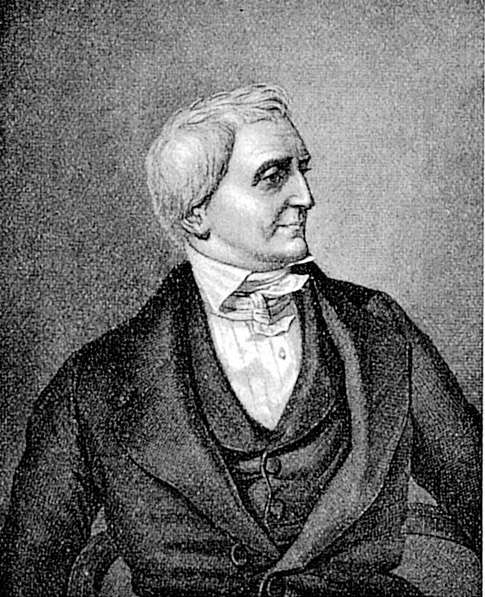 ШЛОССЕР Фридрих Кристоф